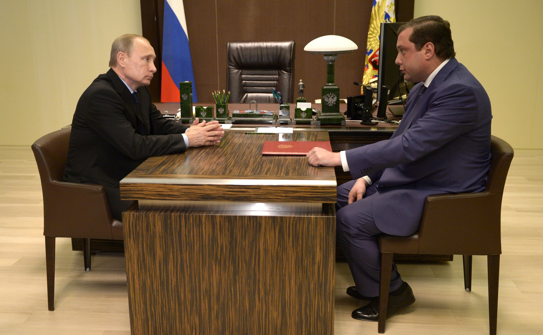 Рабочая встреча Президента России Владимира Путина с губернатором Смоленской области Алексеем Островским